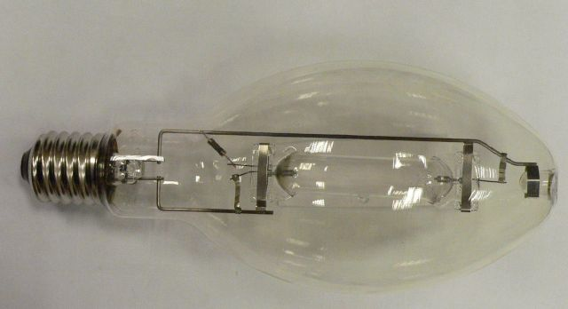 Fénypor nélküli higanylámpa